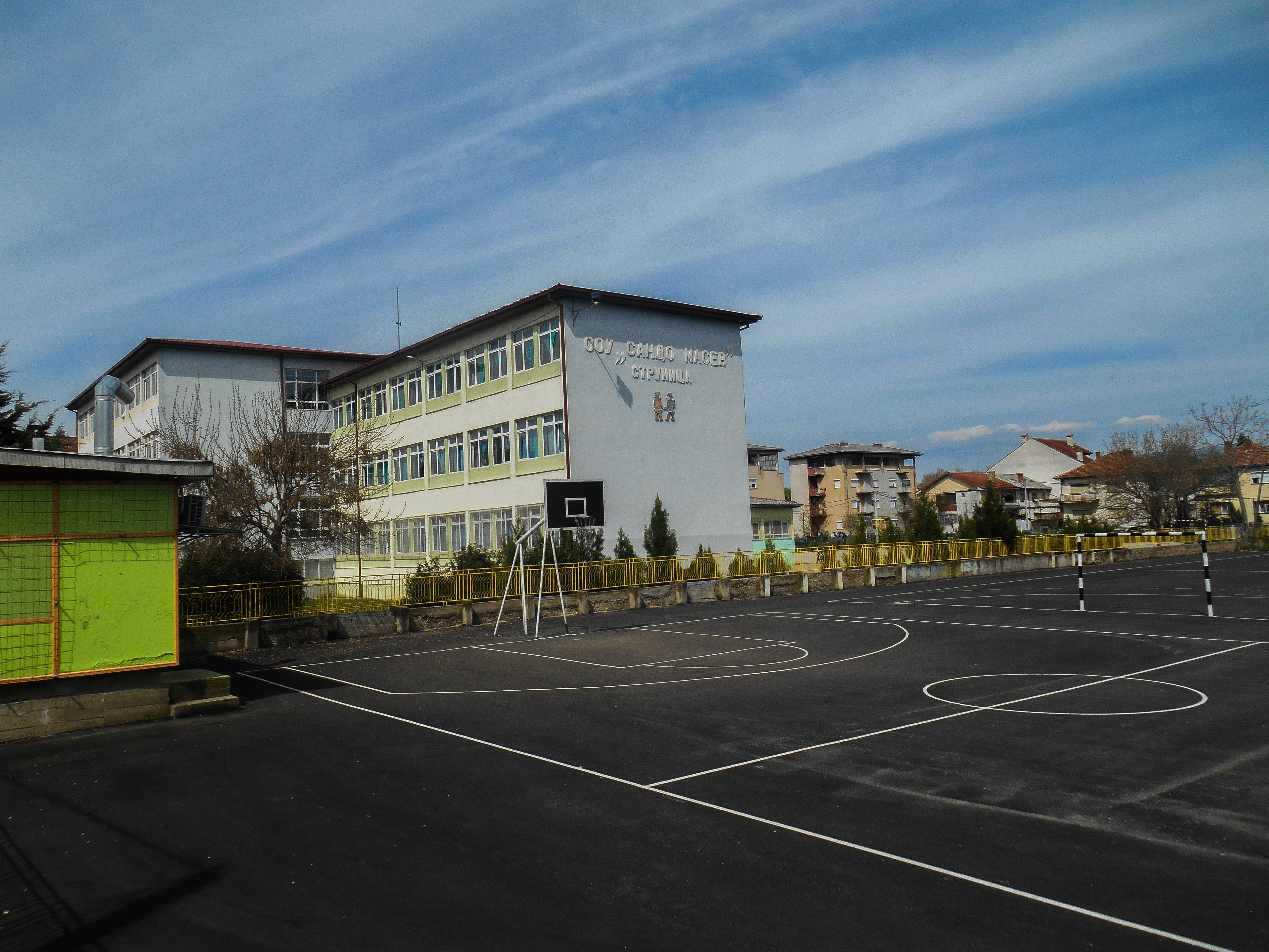 Училиште Јане Сандански